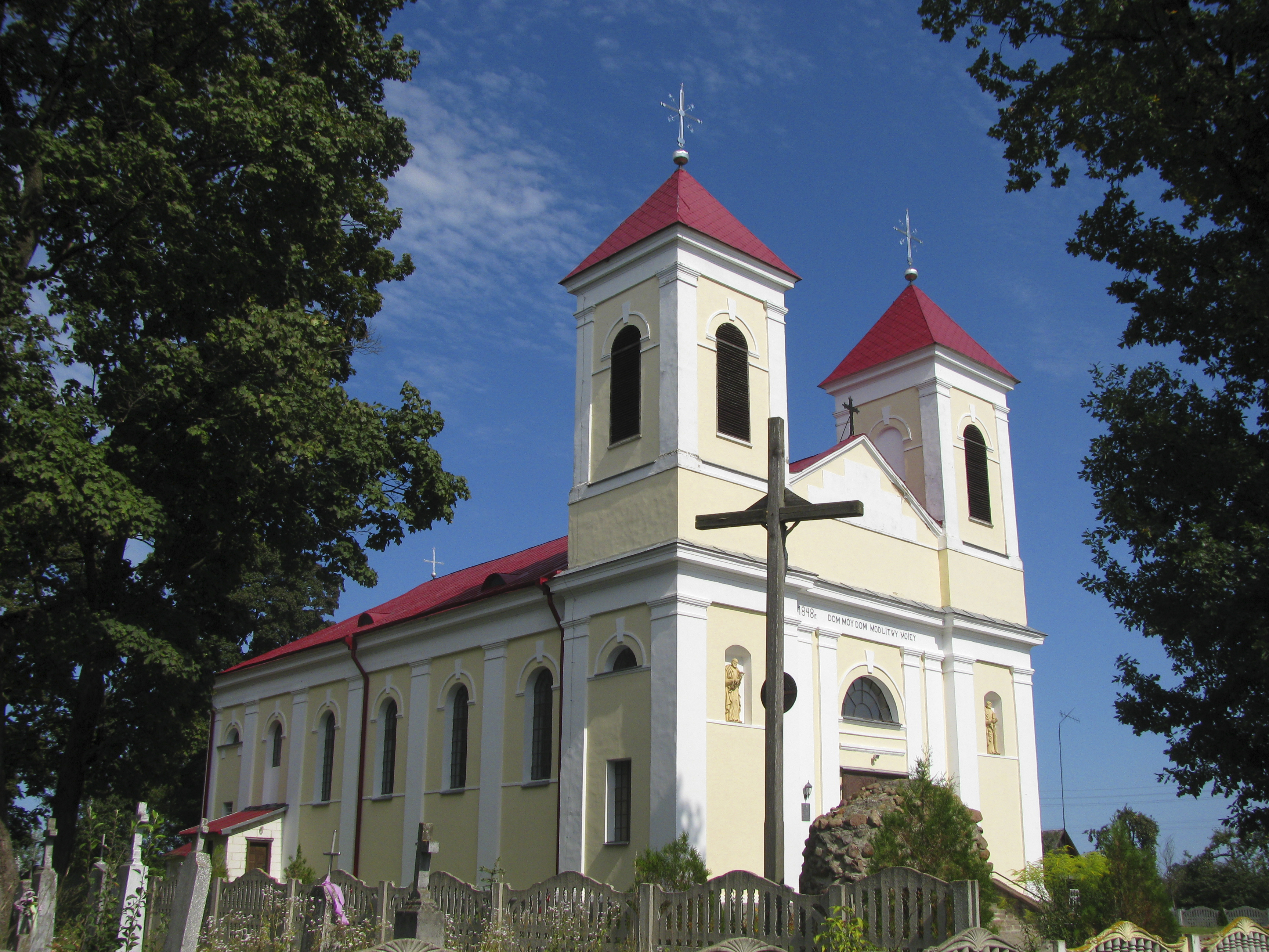 Беларуская (тарашкевіца): Траецкі касьцёл. г. п. Шарашова This is a photo of Belarusian heritage monument. Reference number: 112Г000657 ( WLM)